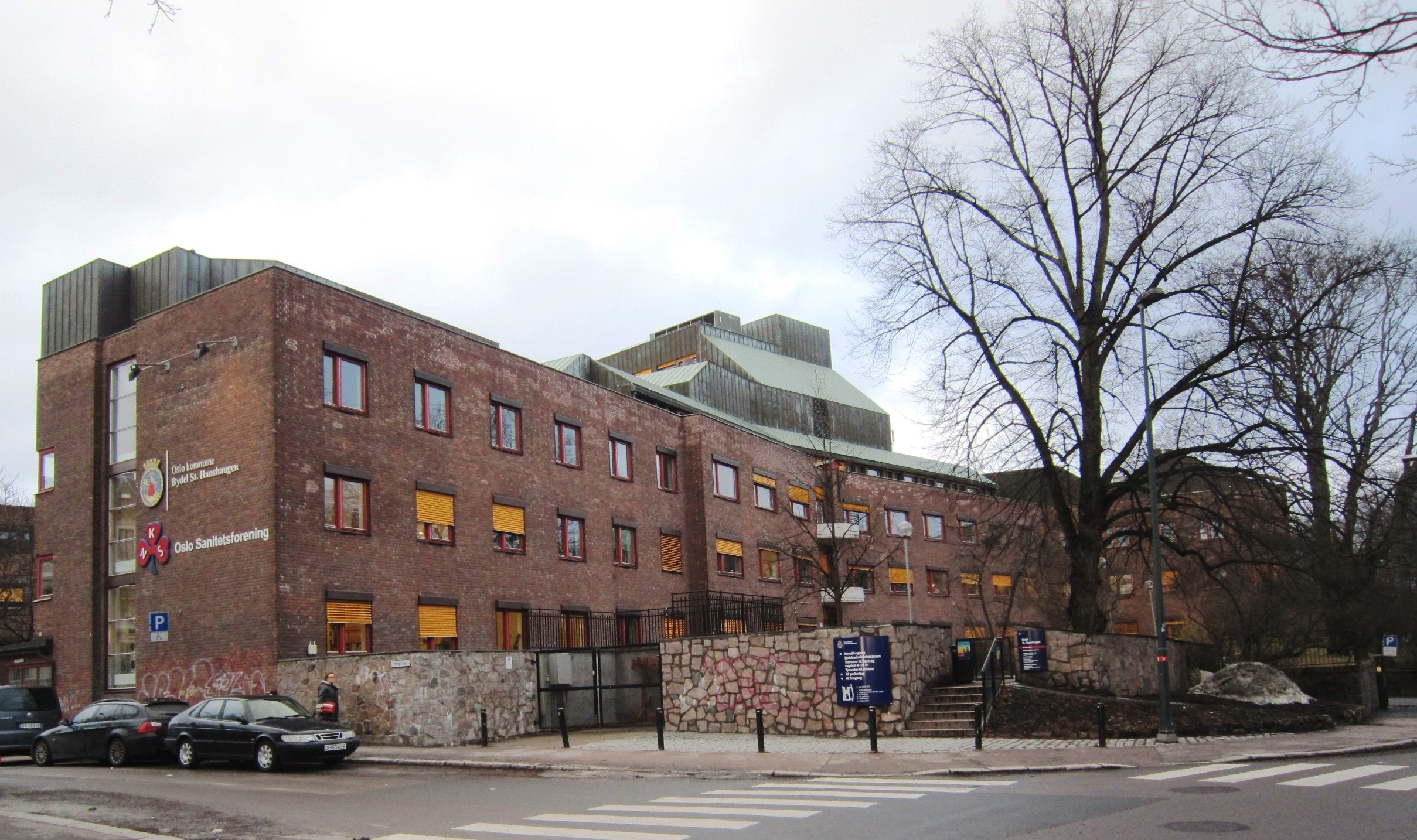 Bydelsadministrasjonen for St. Hanshaugen, i krysset mellom Bergstien og Akersbakken